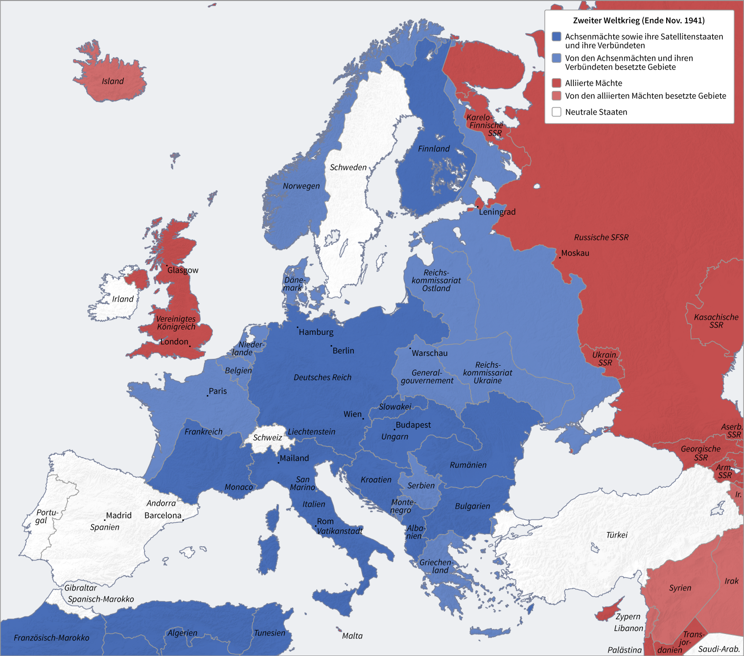 Zweiter Weltkrieg (Ende Nov. 1941)